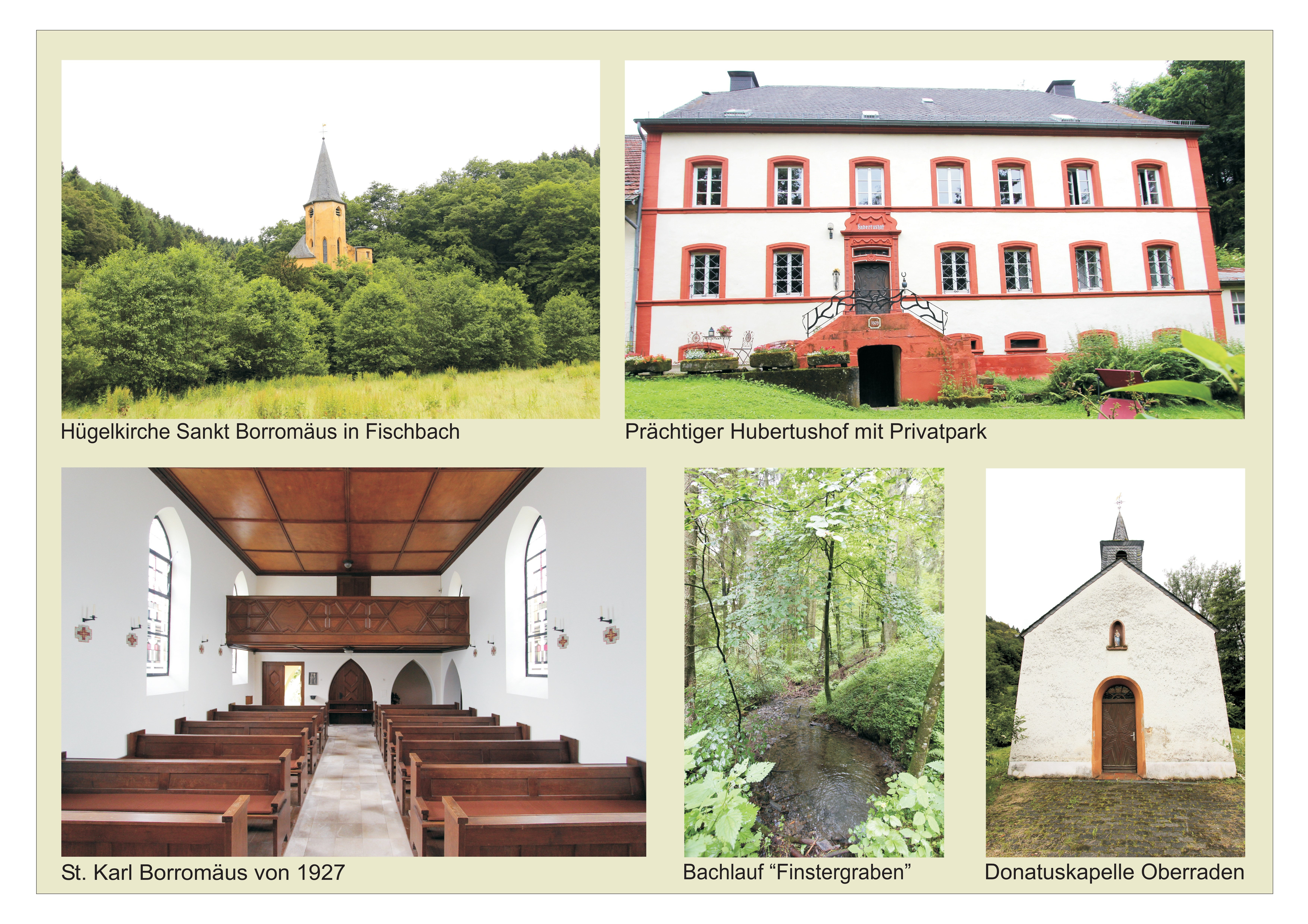 54675 Fischbach-Oberraden in der Eifel.